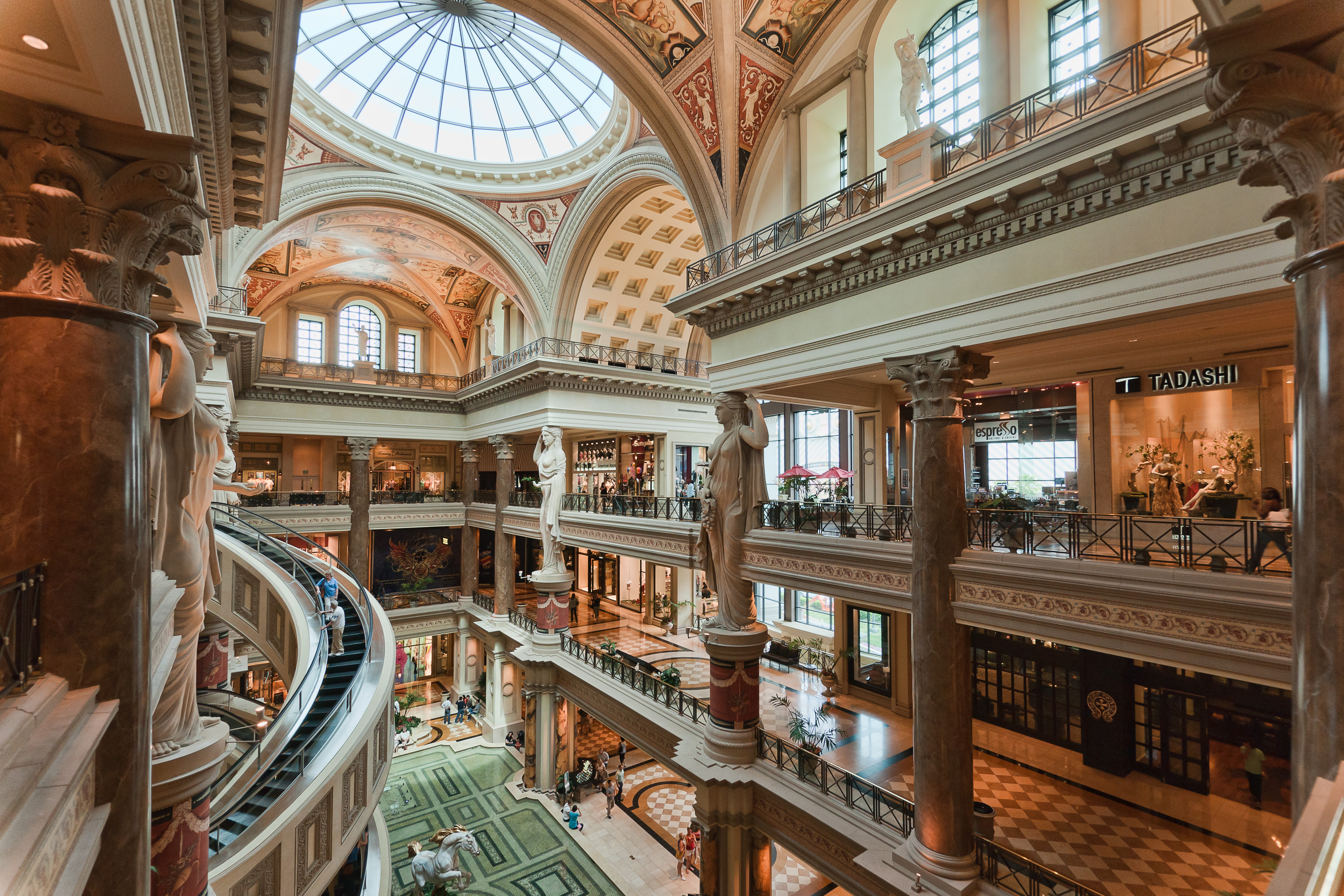 Galeries marchandes du Caesar's Palace